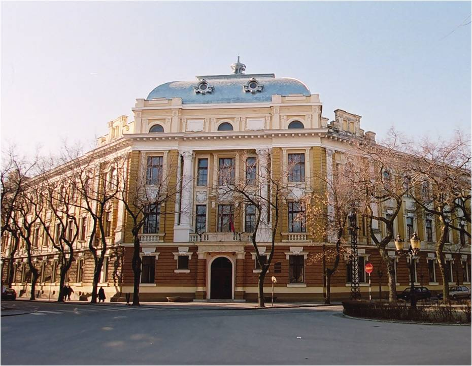 Svetozar Marković Gimnázium, Szabadka